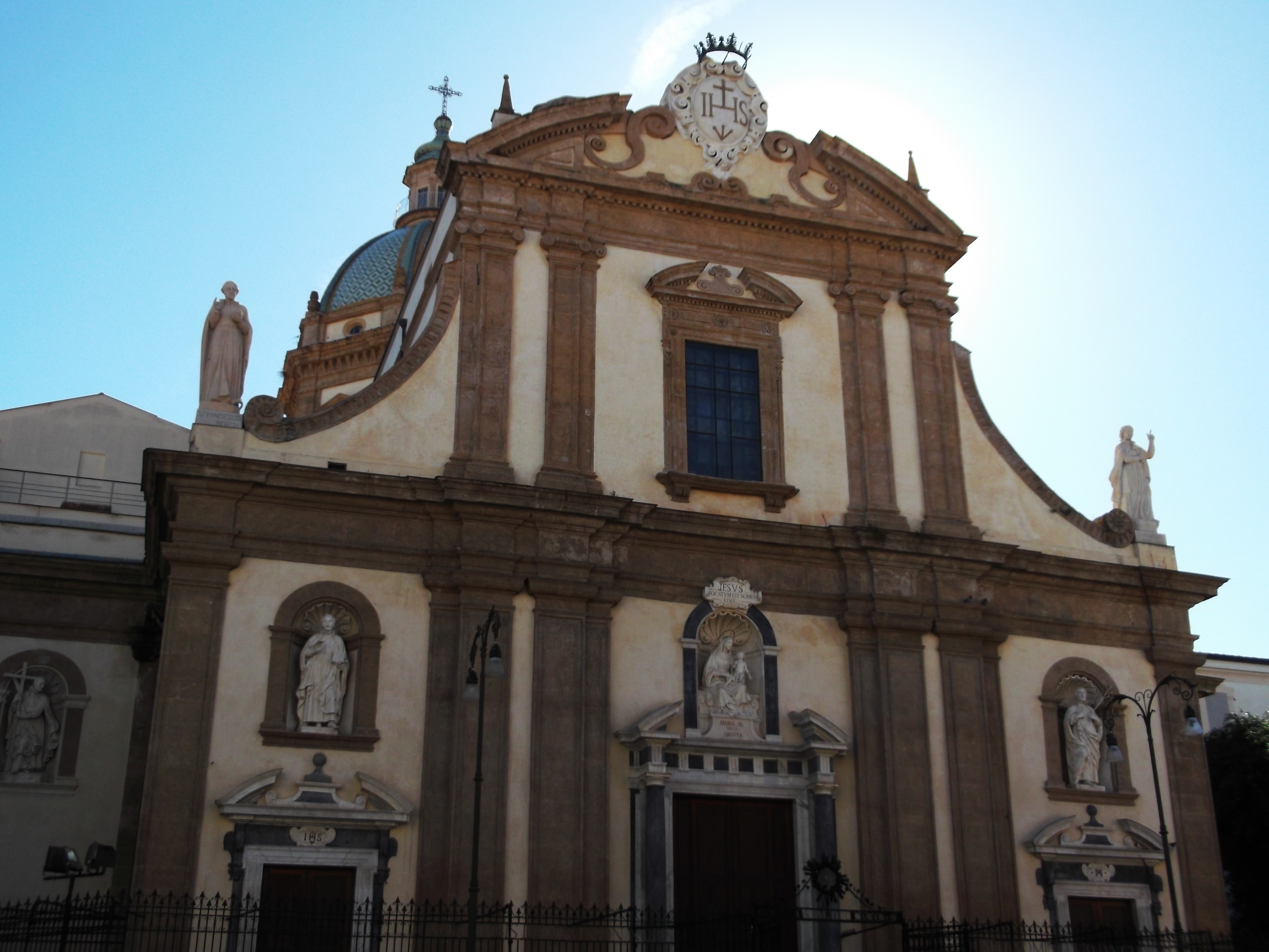 Facciata